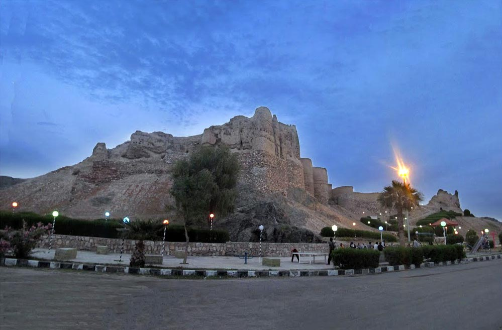 قلعه تاریخی منوجان، از آثار بجامانده از زمان ساسانیان می‌باشد که در شهری با همین نام قرار دارد. این قلعه در طول تاریخ، بارها توسط اقوام و طوایف مختلف، مورد هجوم و غارت قرار گرفته است.